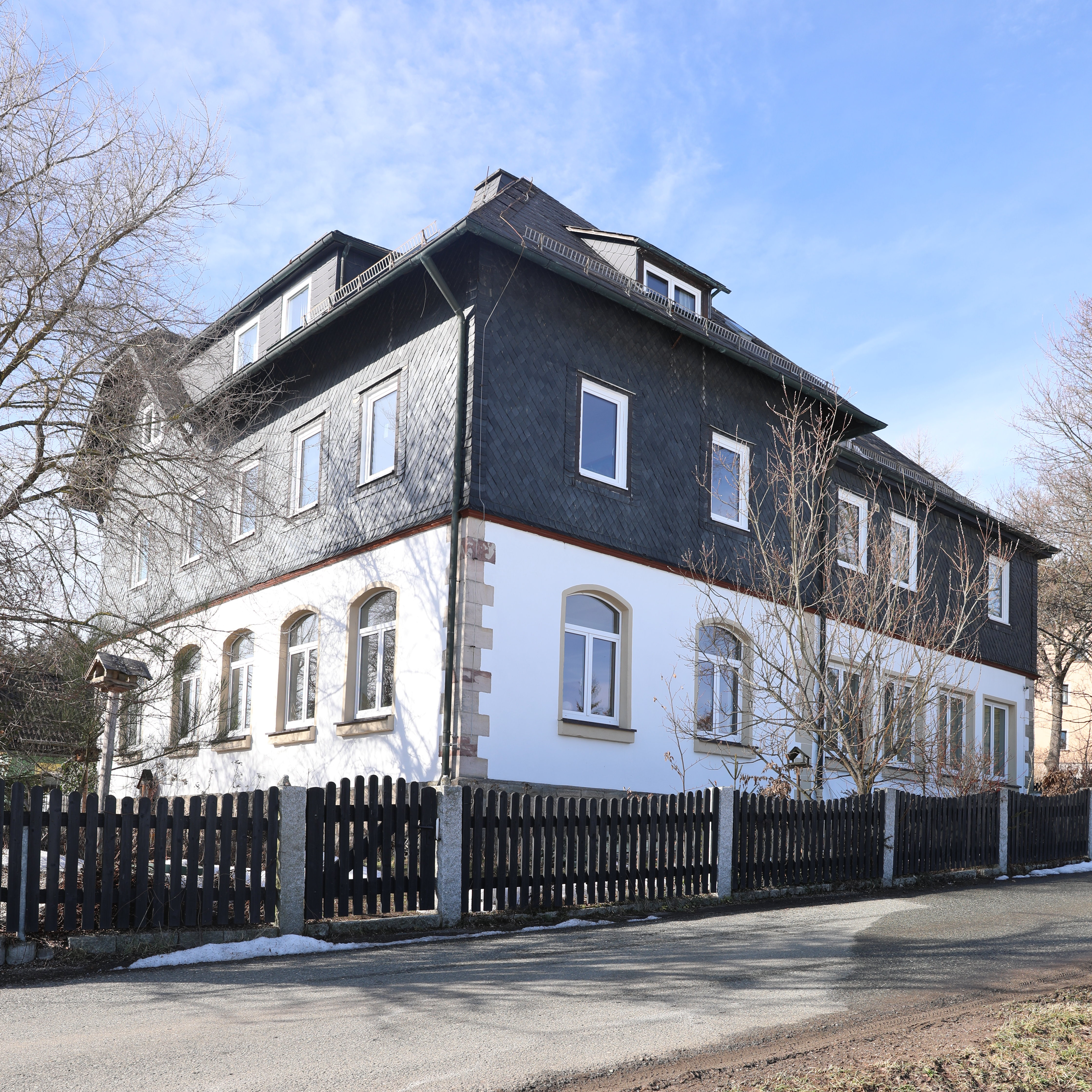 Alte Schule in Mittlere Schnaid, Ot von Wallenfels